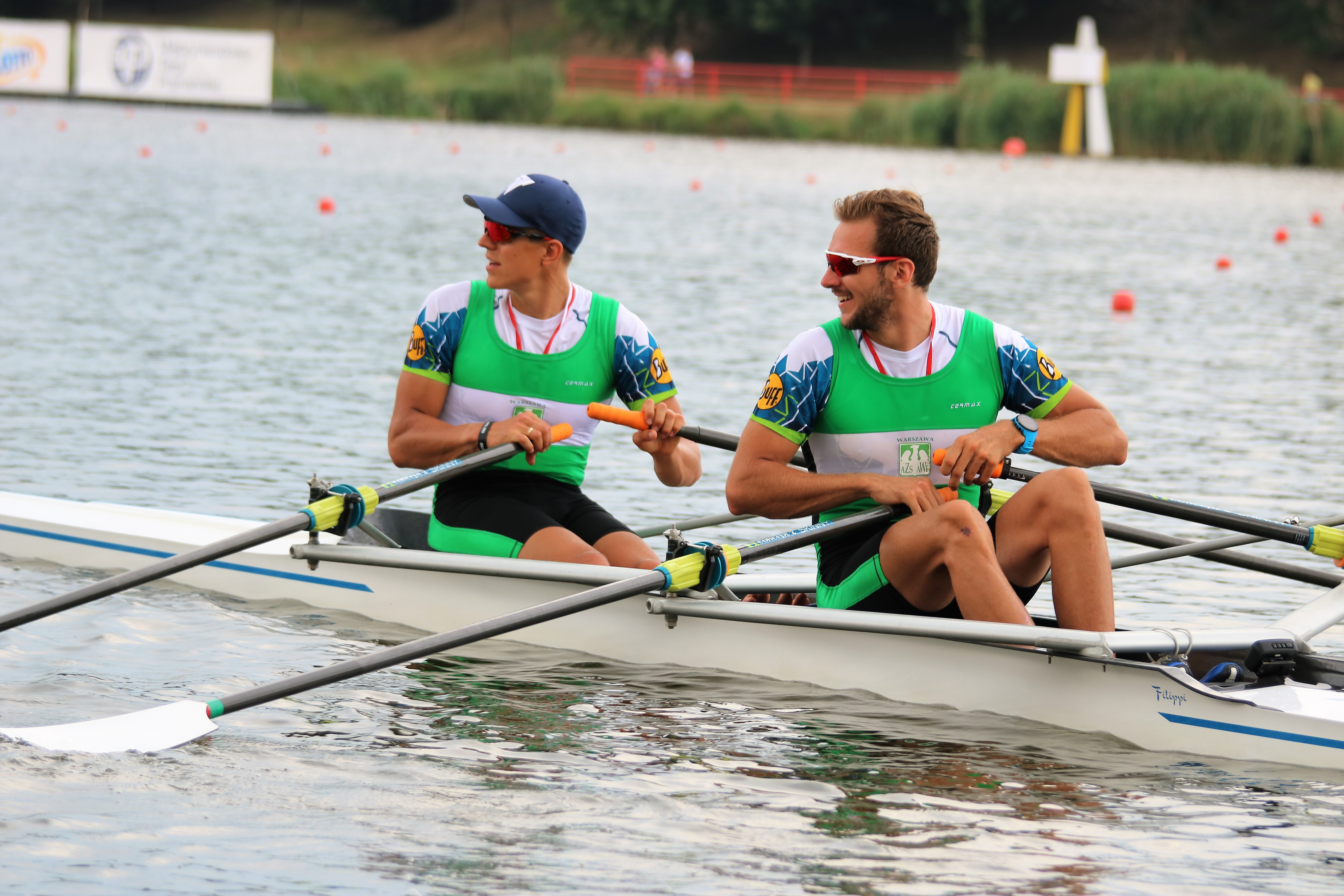 Mistrzostwa Polski Seniorów, Poznań (10.06.2018) złoci medaliści biegu 2xMA - osada AZS-AWF Warszawa (Sz. Pośnik, D. Czaja)